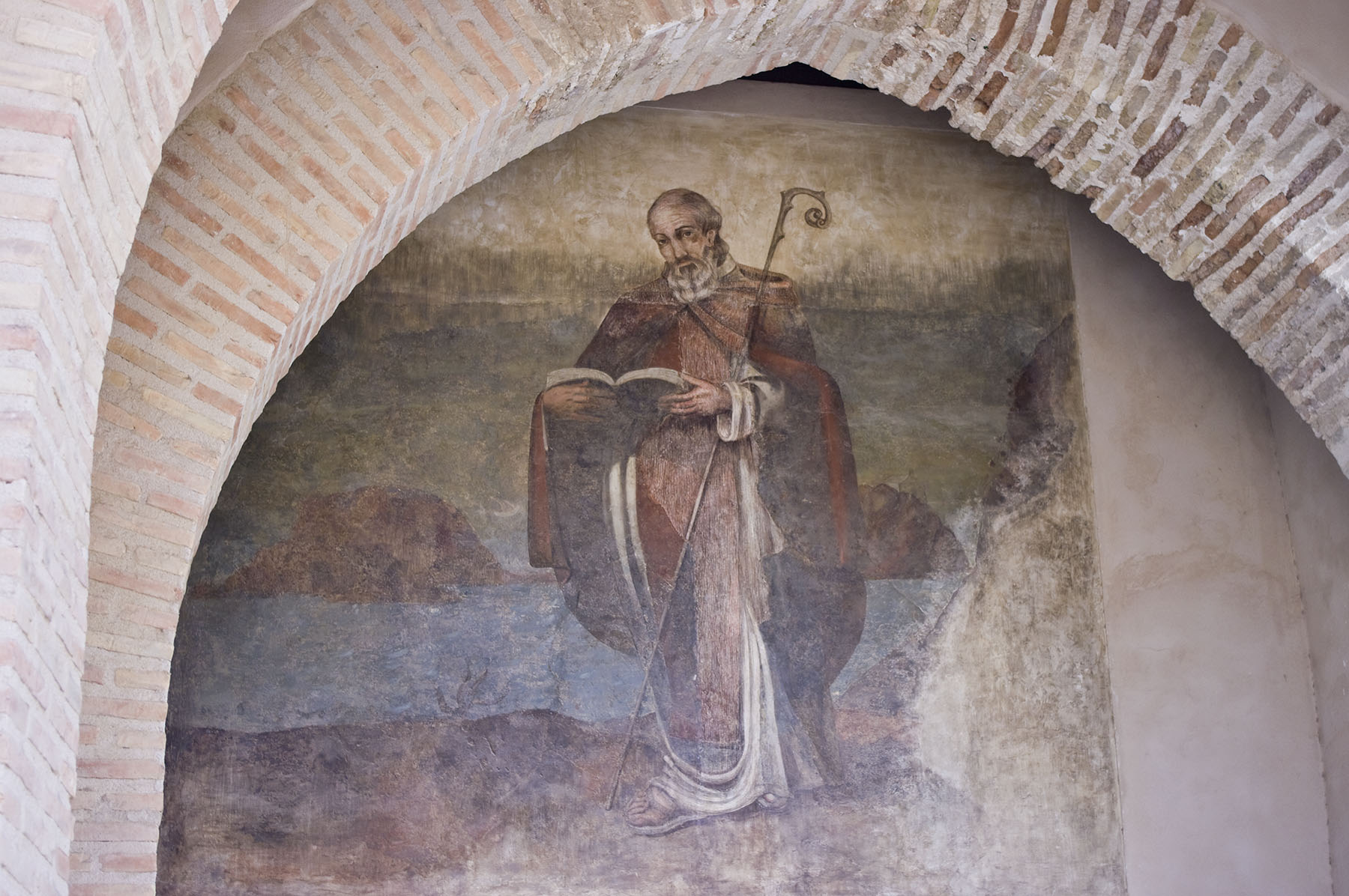 Interior del Porche de San Antonio en Lorca (Murcia)